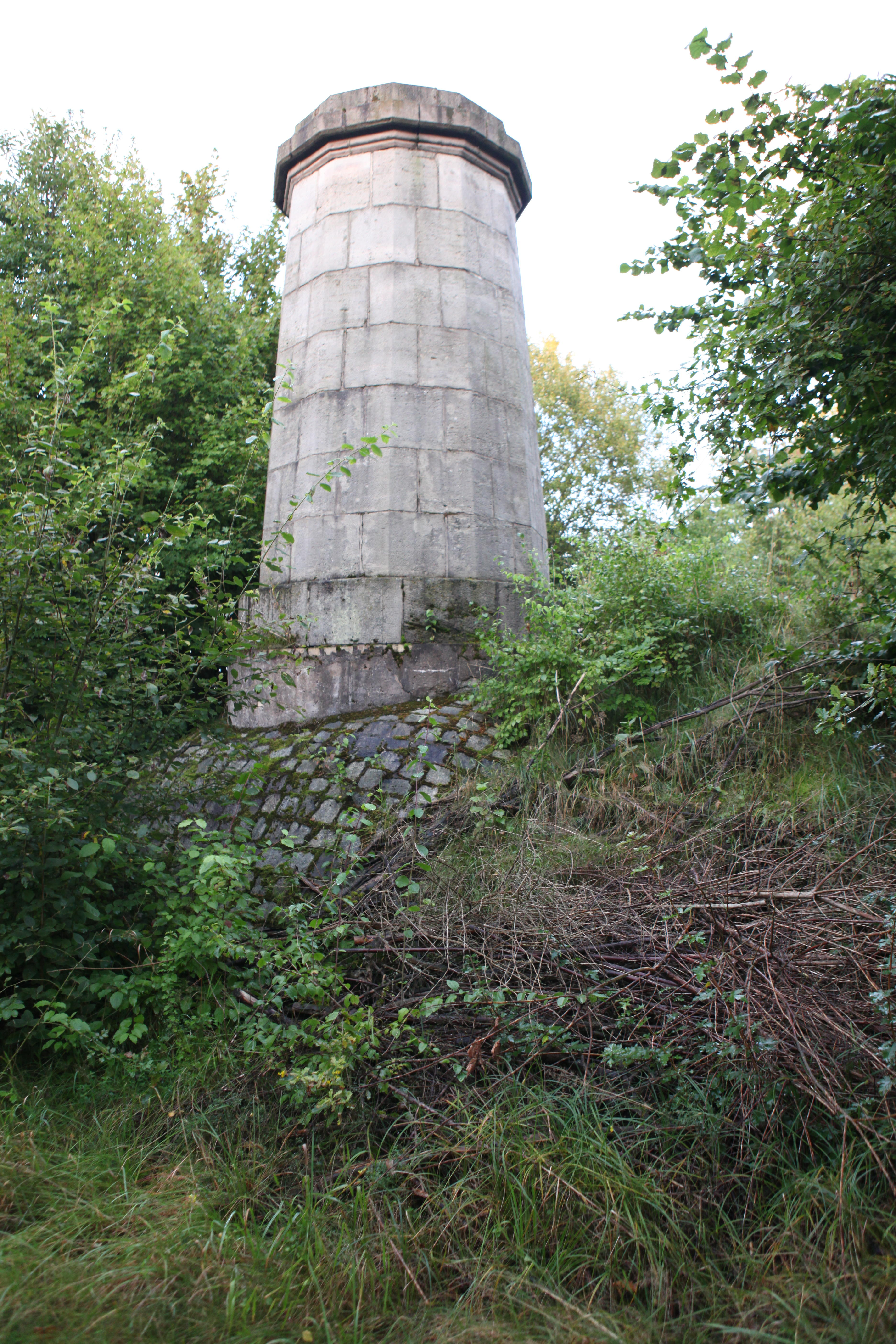 Hönebachtunnel, Abluftkamin